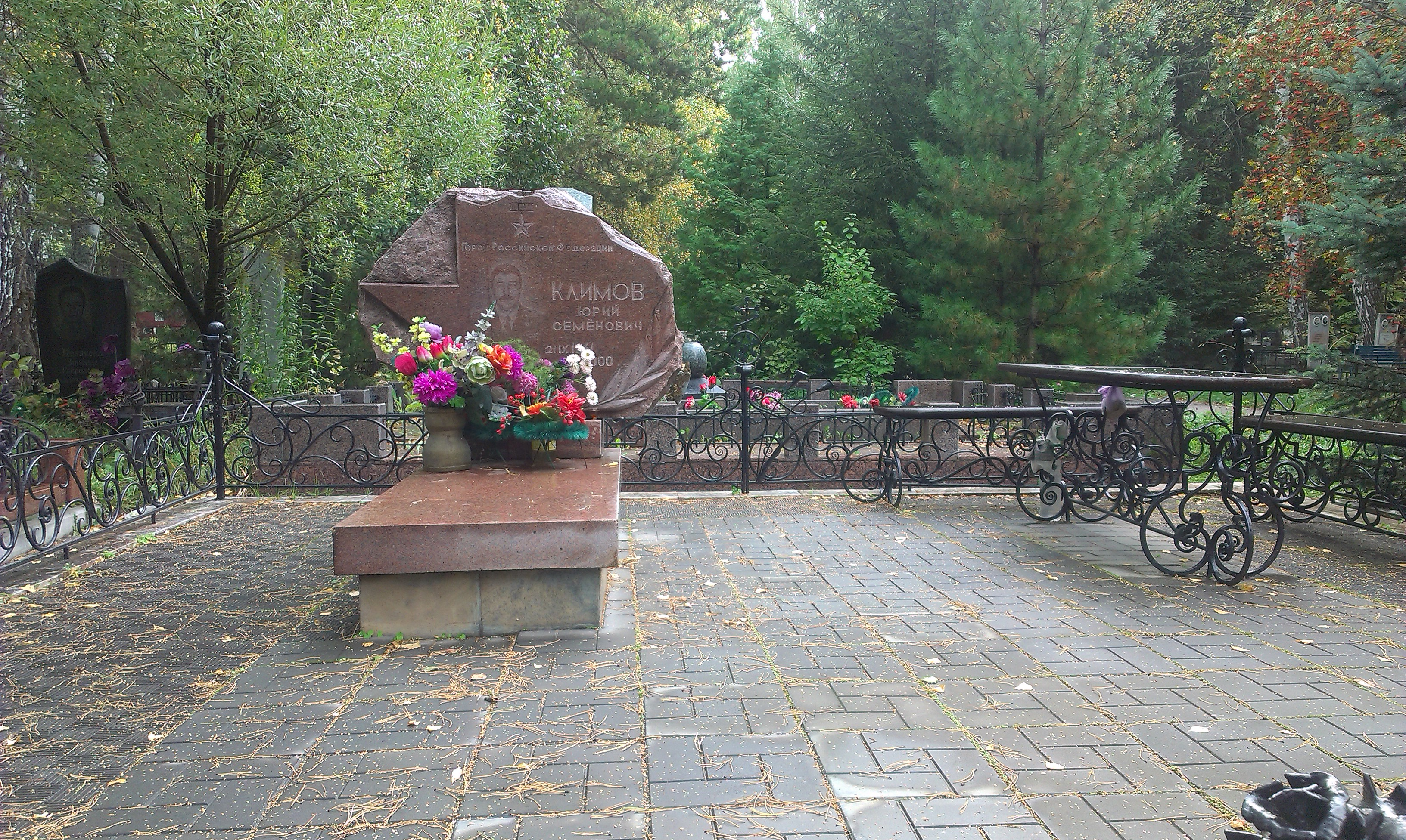 Южное (Чербузинское) кладбище